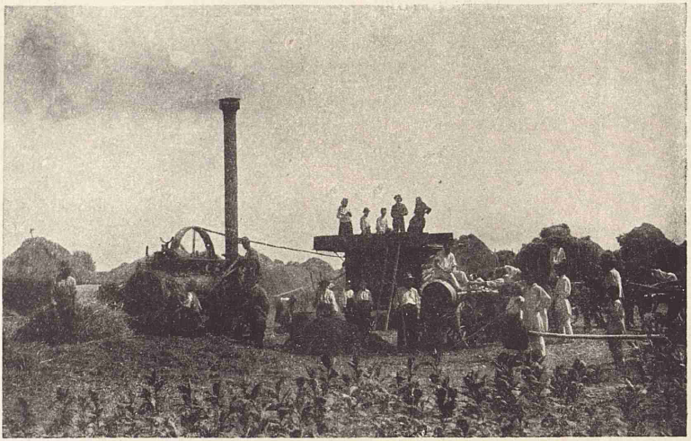 Reproducerea unei fotografii din anii 30 ai secolului XX